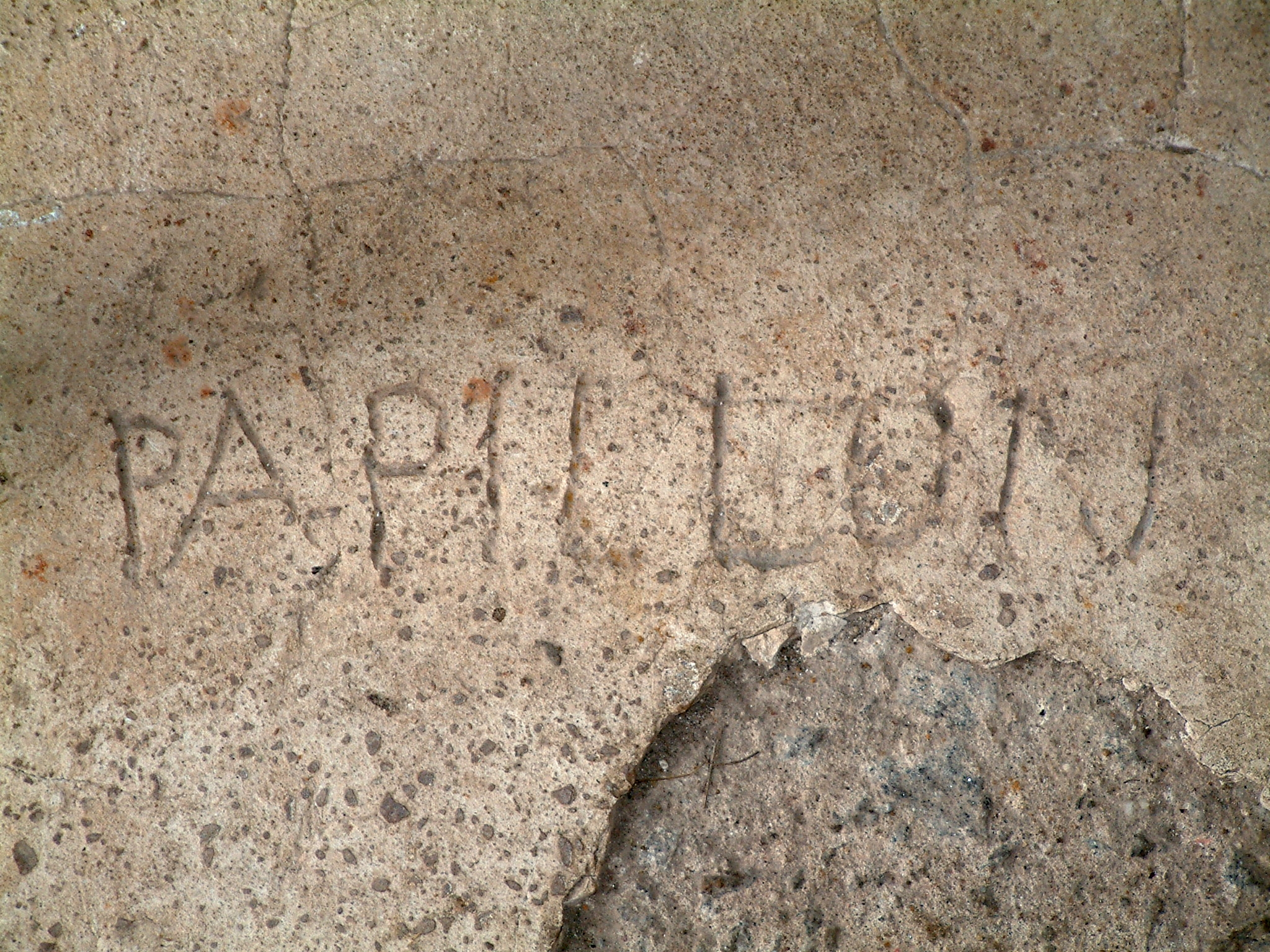 Camp de la Transportation, (Classé, 1995) .